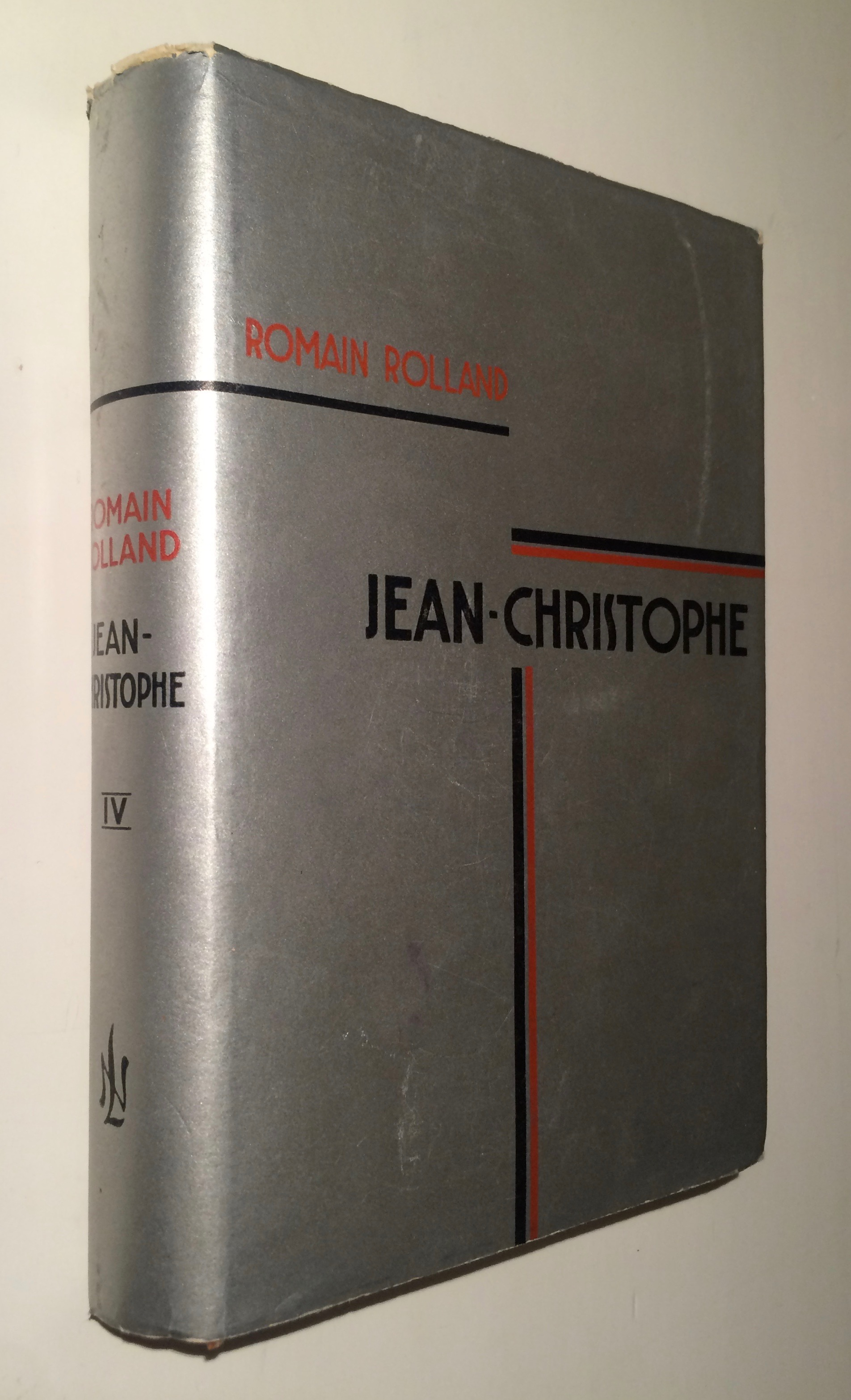 Ernst Kollomi poolt kujundatud teine ümbrispaber